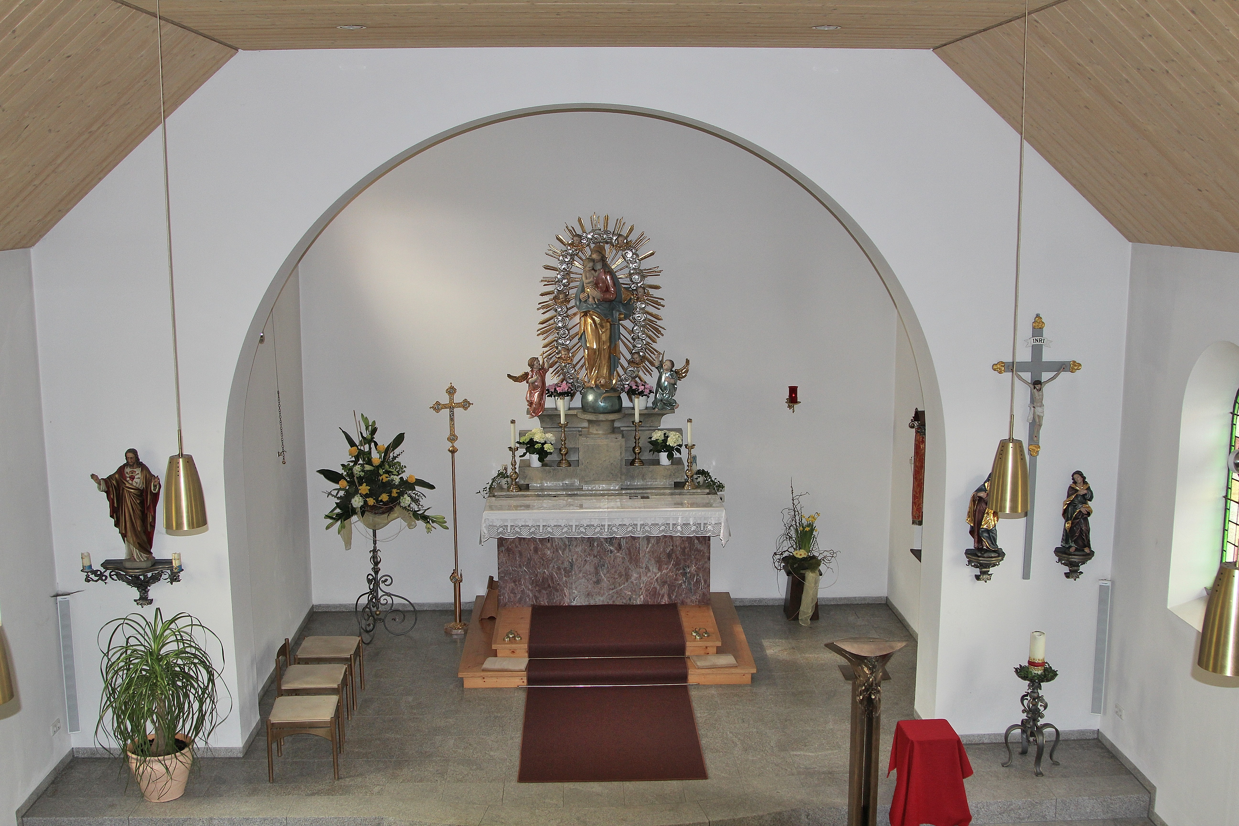 Kaimling, Kirche zur Ehre der Unbefleckten Empfängnis, 1952 geweiht; Stadt Vohenstrauß, Landkreis Neustadt an der Waldnaab, Oberpfalz, Bayern